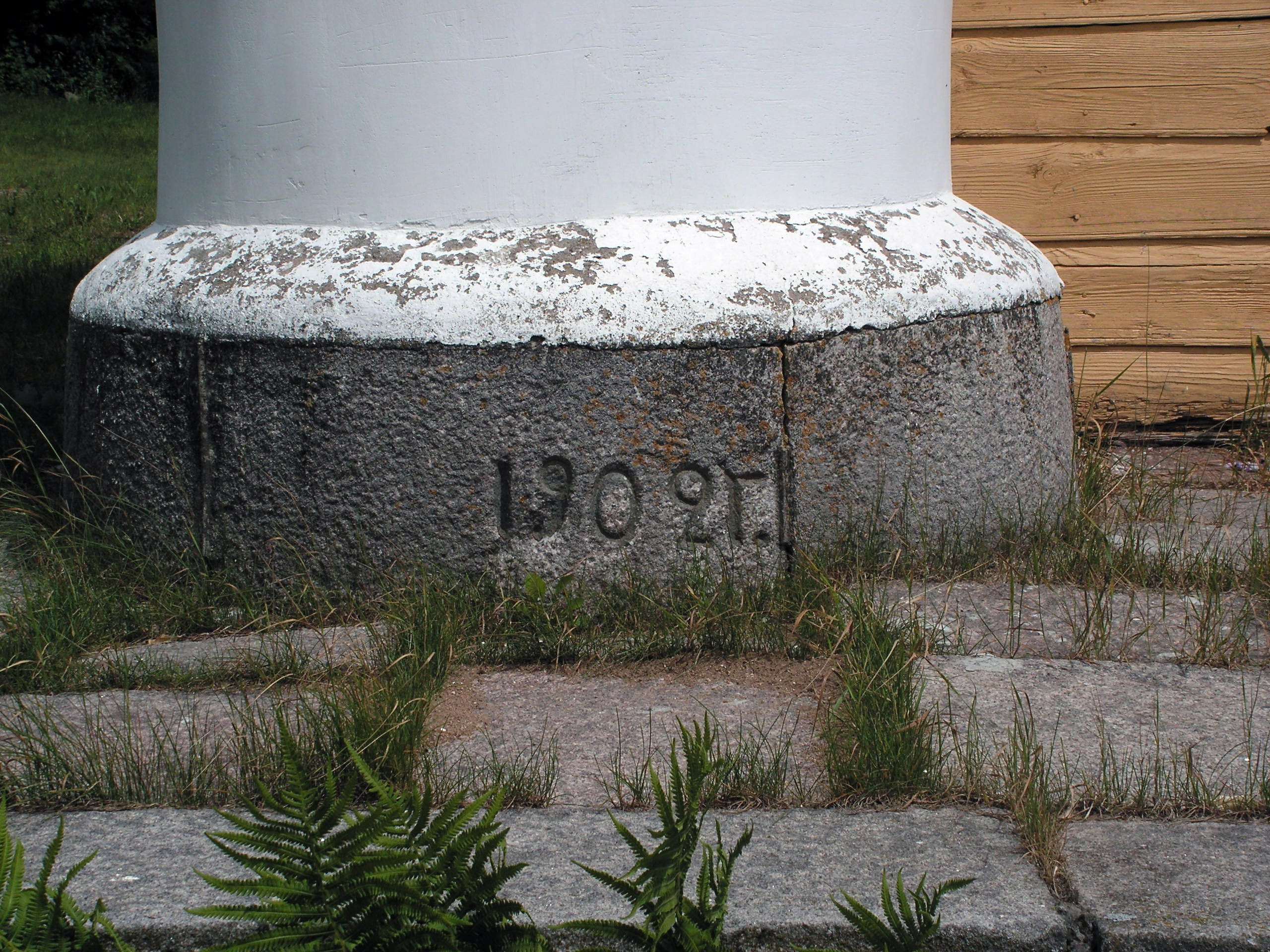 Беларуская (тарашкевіца): Калёна касьцёлу Сьвятой Тройцы ў Данюшаве (Смаргонскі раён).